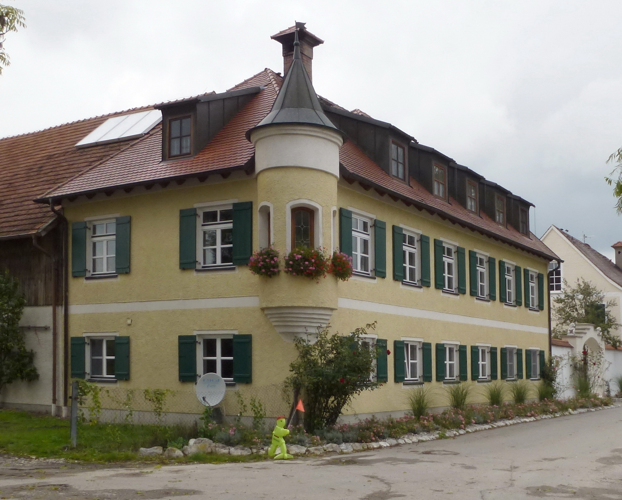 Alling-Holzkirchen, Weiherstr.8: Ehemaliges Hofmarkschloß am Schloßweiher, heute Bauernhof This is a photograph of an architectural monument.